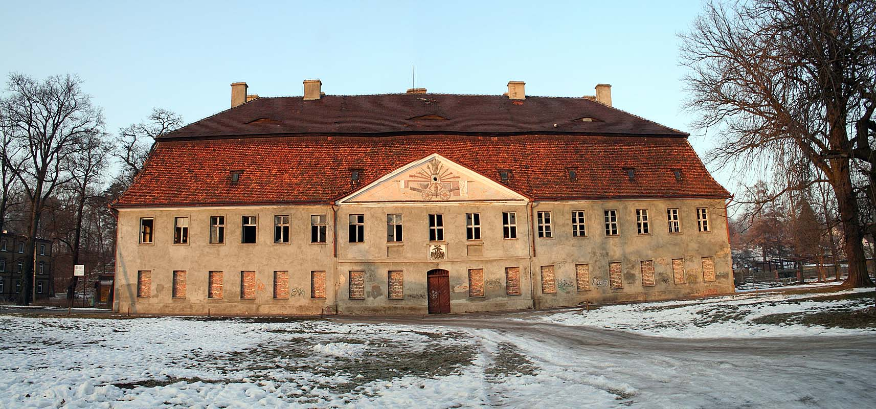 Jasien - zamek z XVIII w